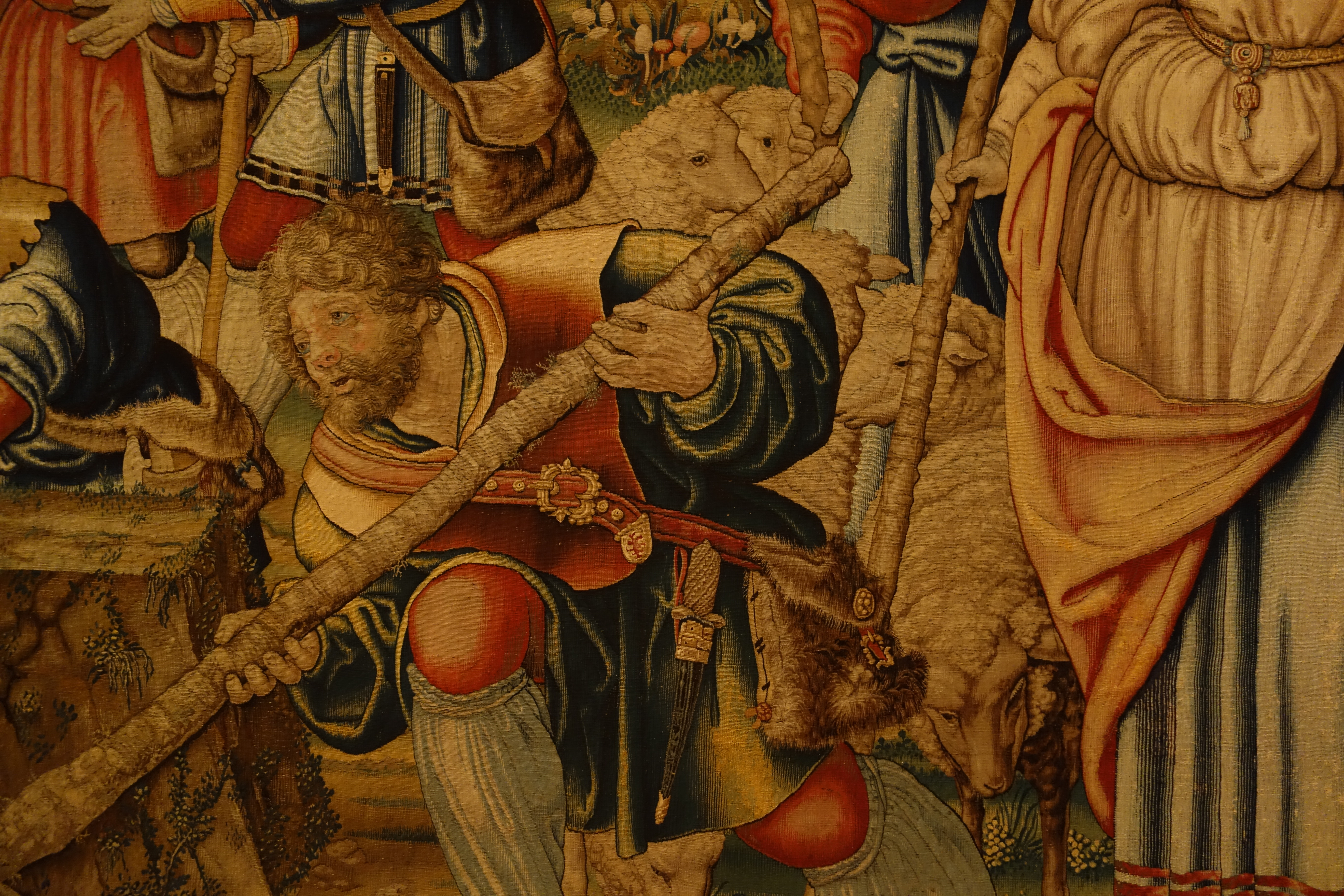 Leven van Jacob tapijtreeks. Detail